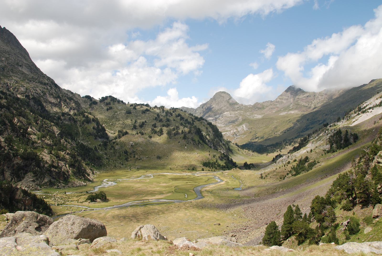 El plan dels Aigualluts desde la Balleta de l'Escaleta